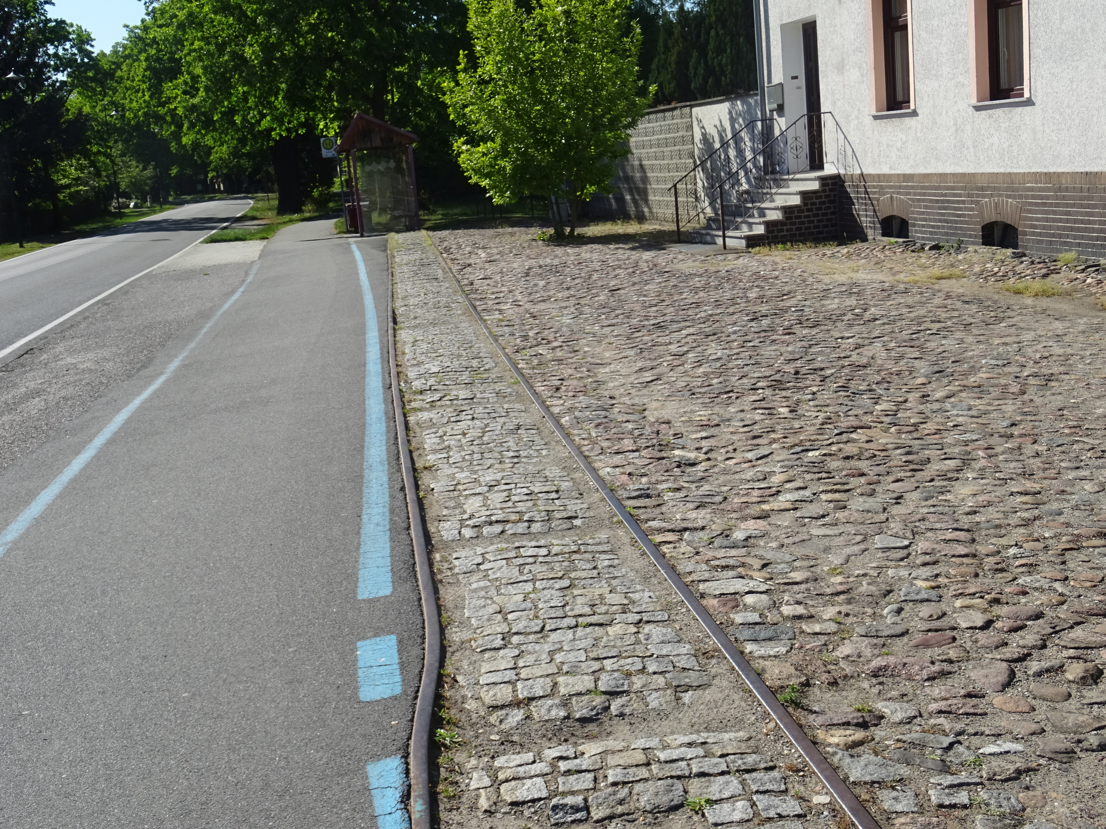 Gleisrest der Schmalspurbahn in Holbeck